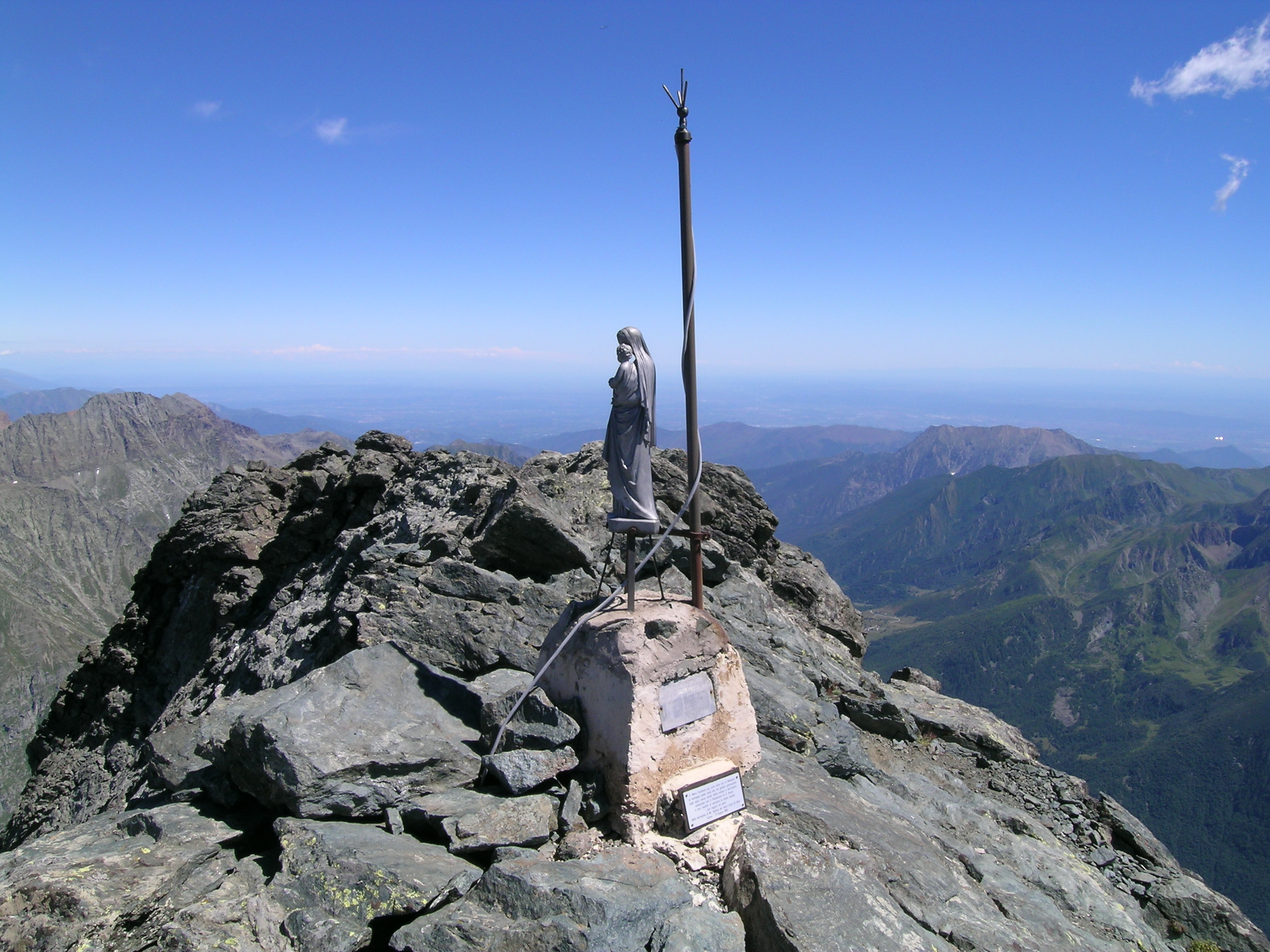 La vetta della montagna con la statuetta della Madonna